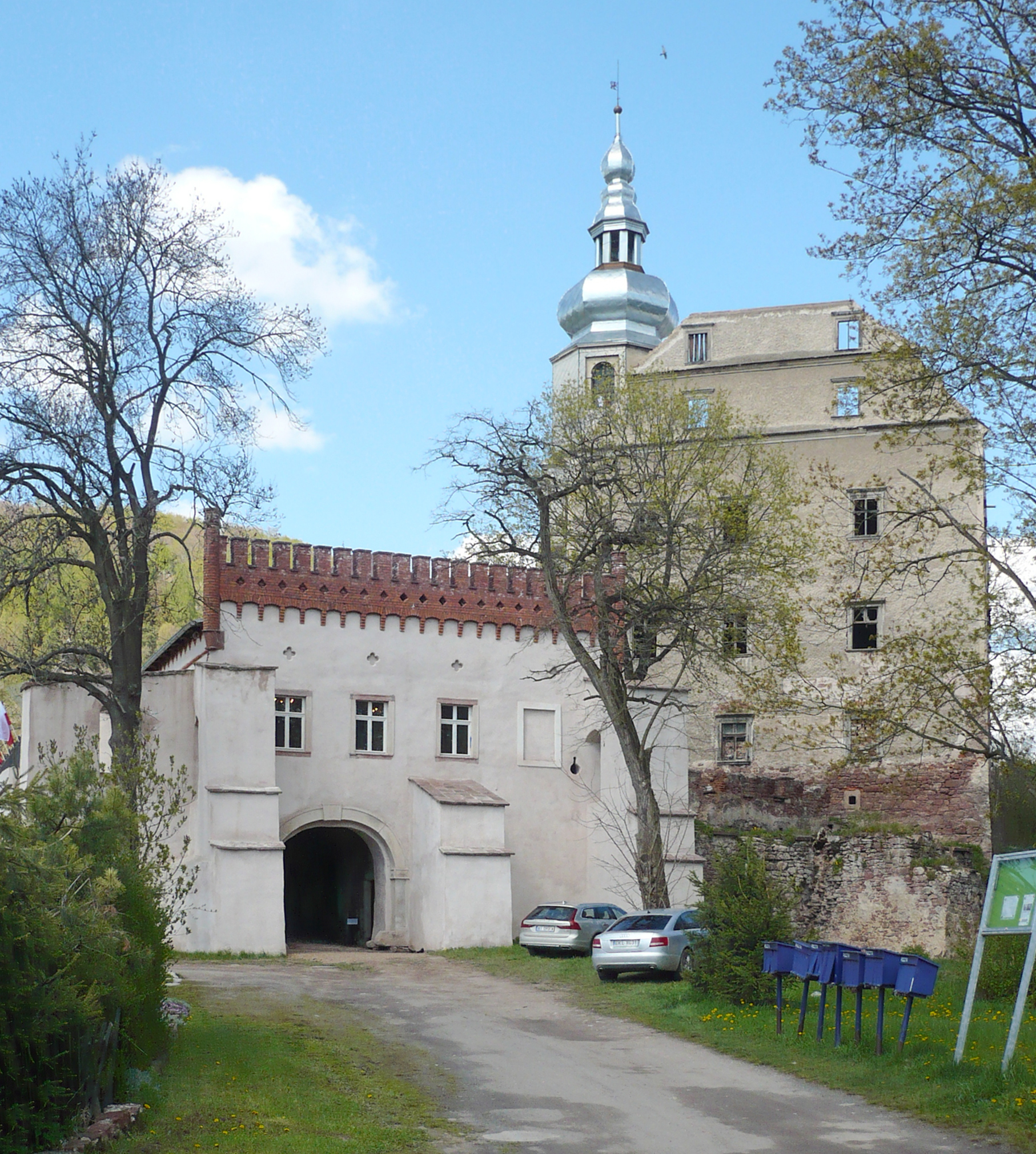 Ścinawka Górna. Budynek bramny